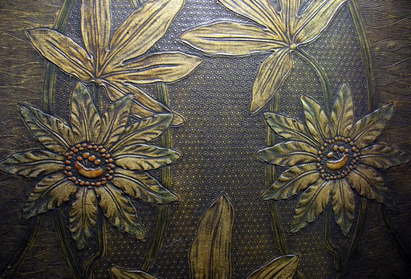 Lincrusta-Tapete in einer Jugendstil-Apotheke (Herstellung 1901, Detailansicht)